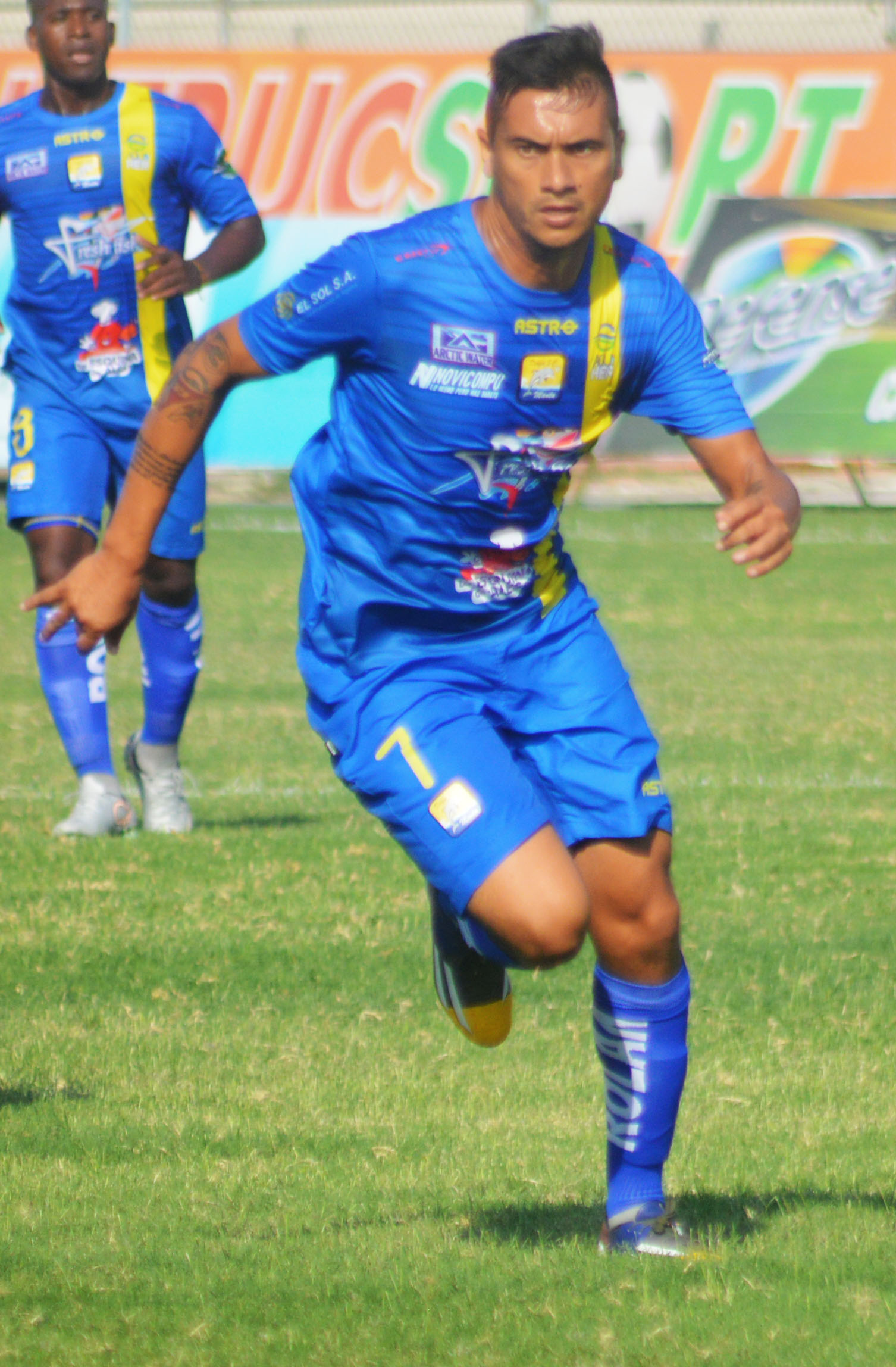 Luis Carlos Espinola en Delfín de Ecuador en 2015